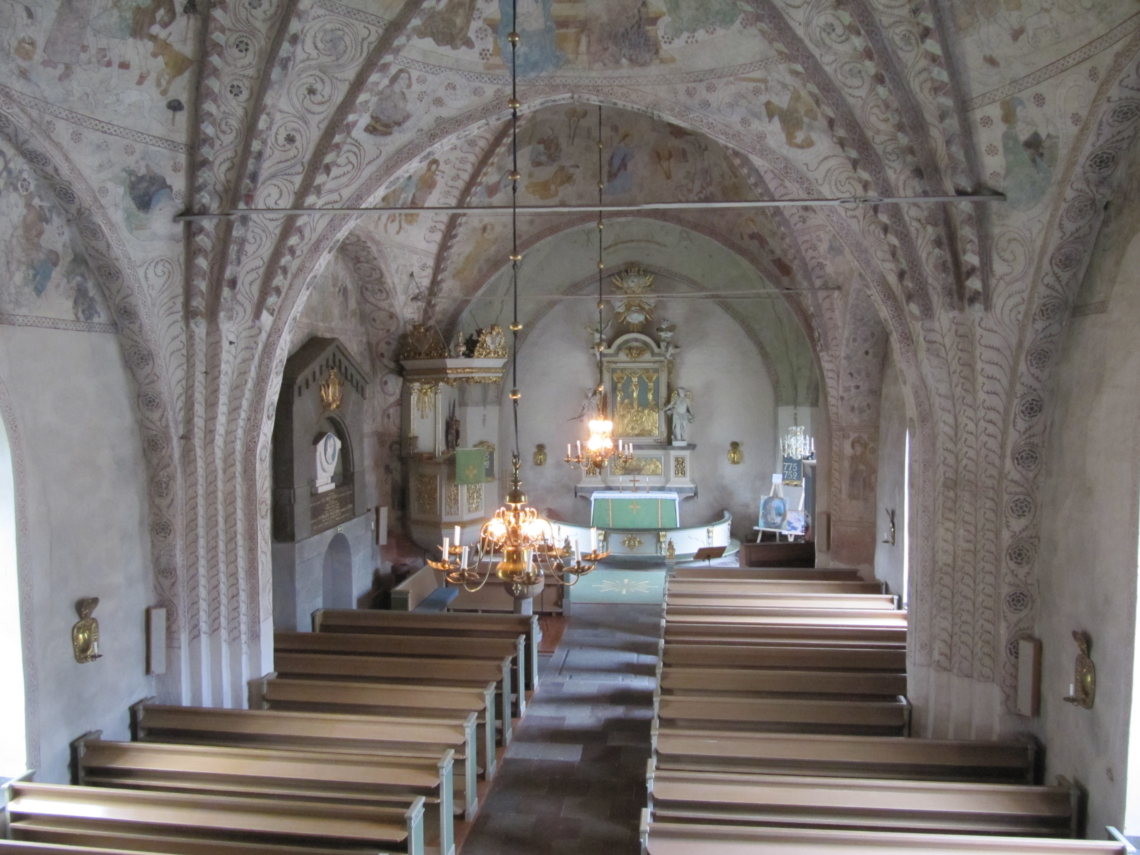 Kyrkorum i Almunge kyrka